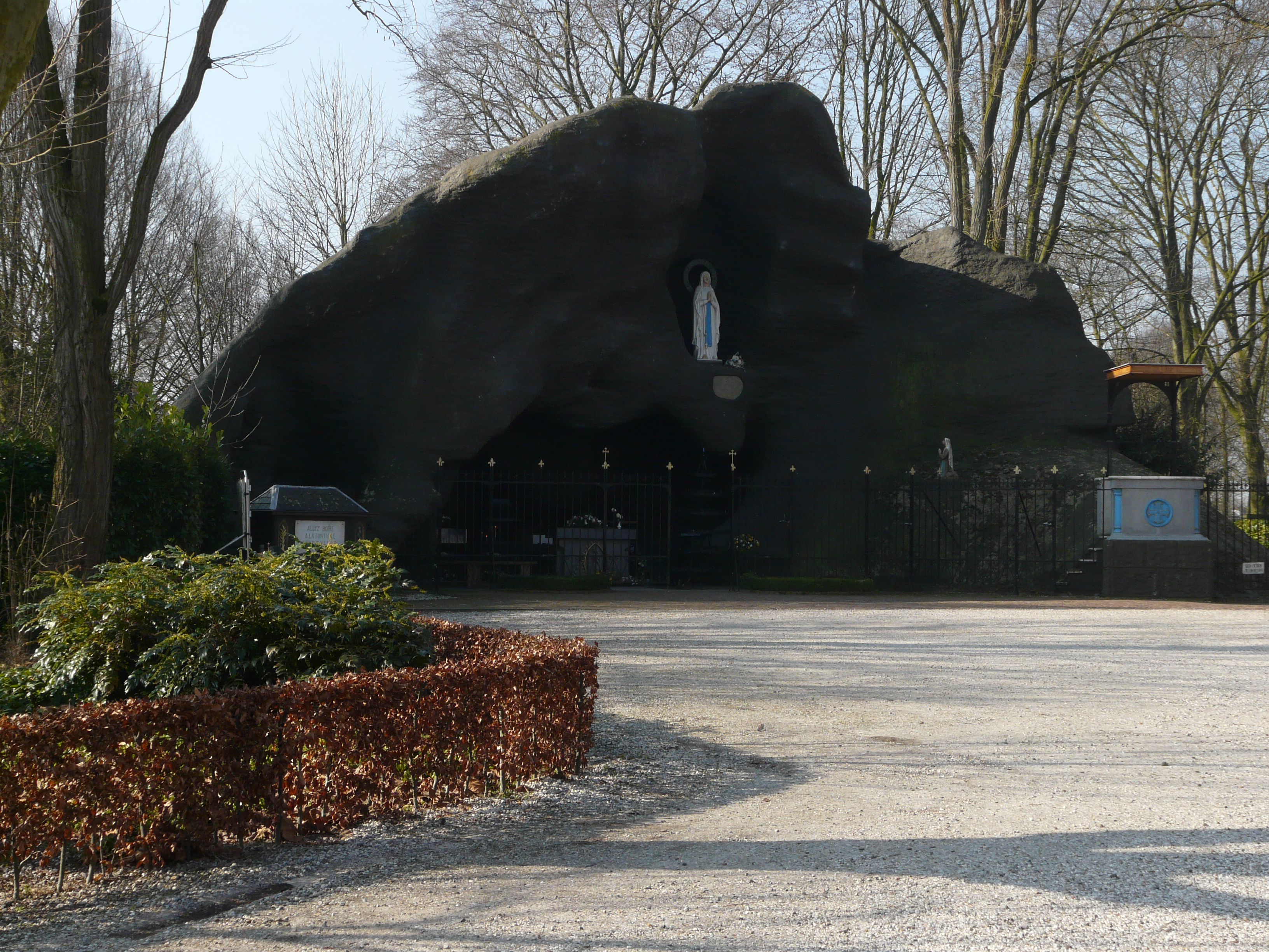 Lourdesgrot Mariahout naast de O.L. Vrouw van Lourdeskerk